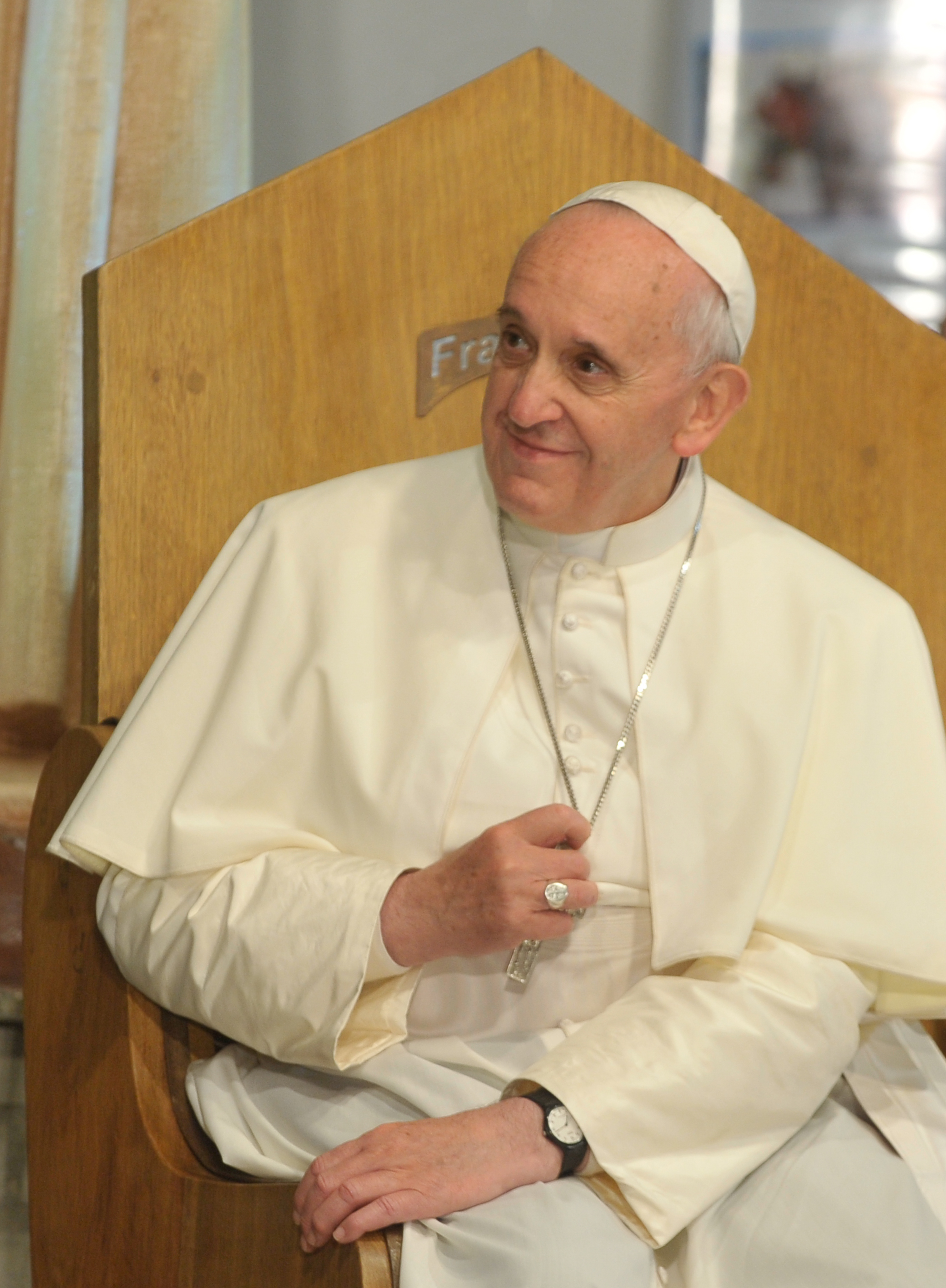 Papa Francisco participa de inauguração do Polo de Atendimento a Dependentes Químicos, do Hospital São Francisco.